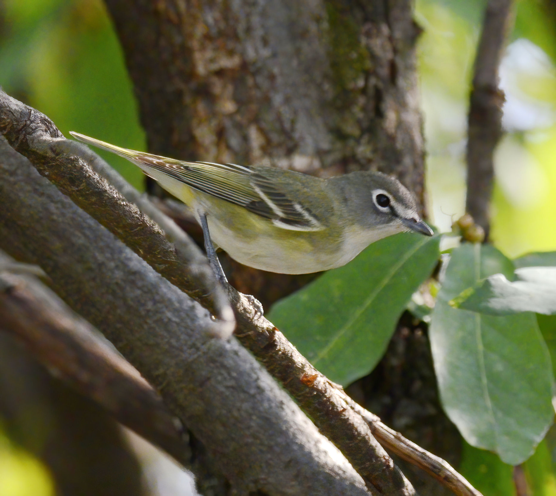 Tepoztlán, Morelos, México